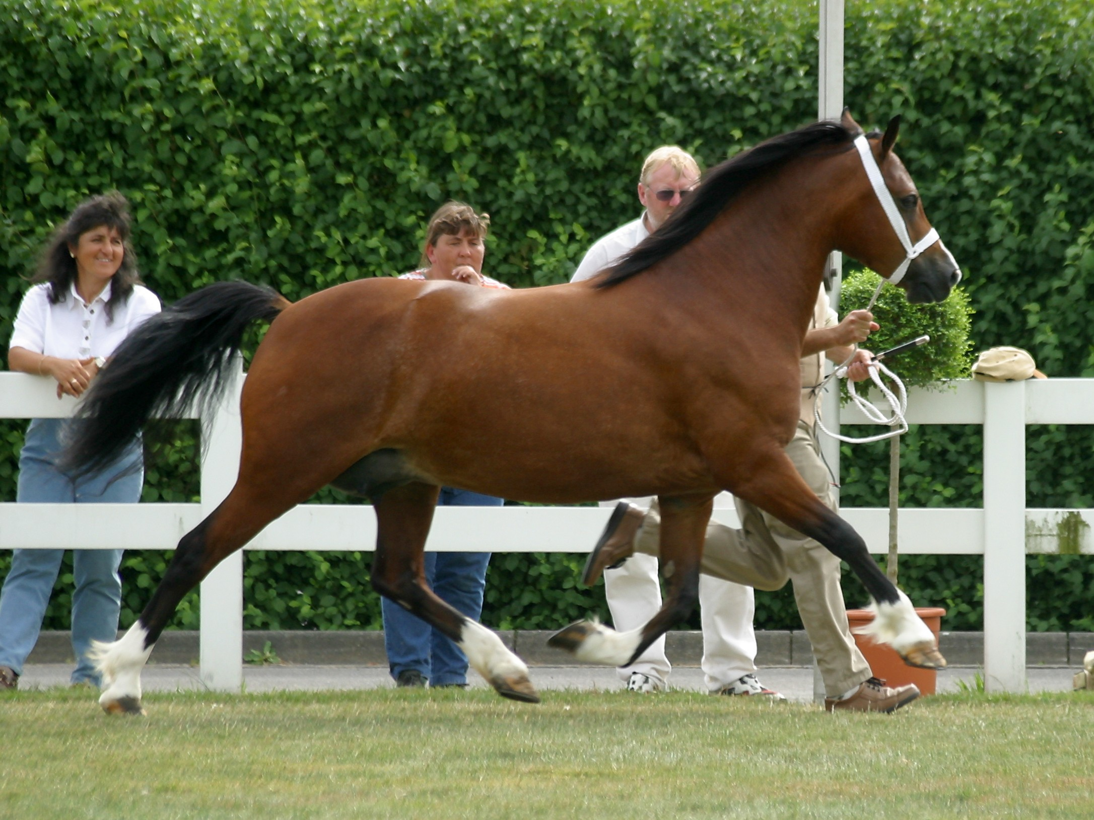 Welsh Pony of Cob Type (Section C) in hand wearing a Yorkshire halter.